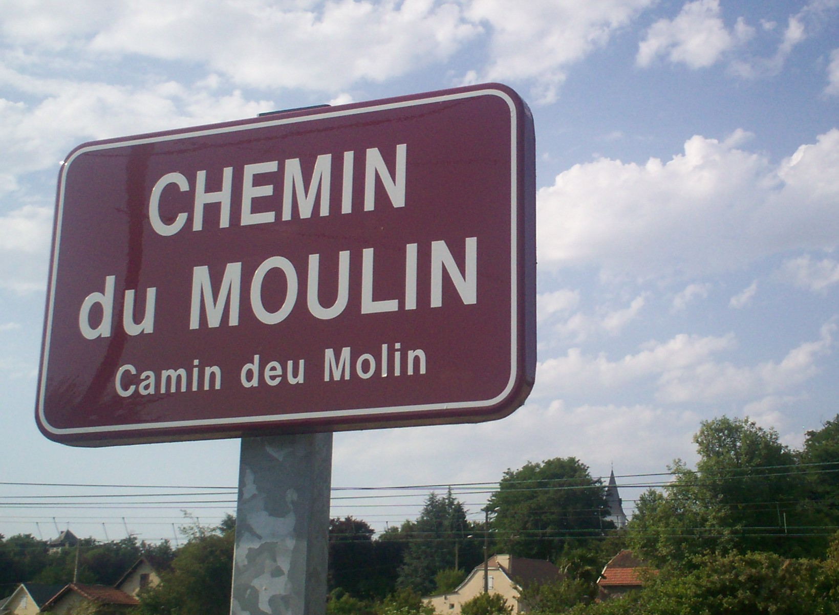 Fotografia personala